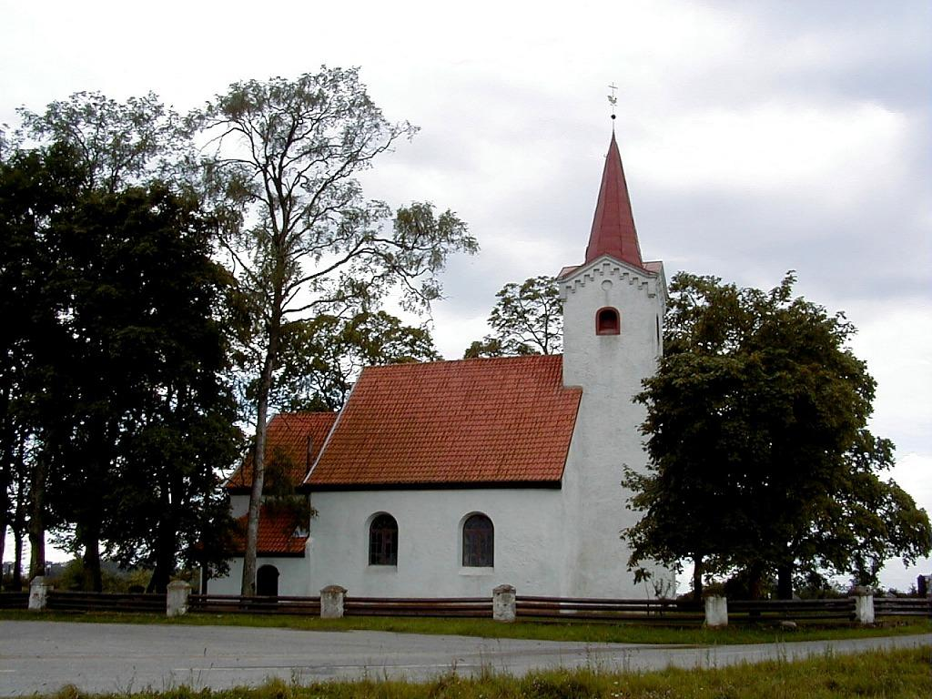 Strazdes baznīca 2000-08-03